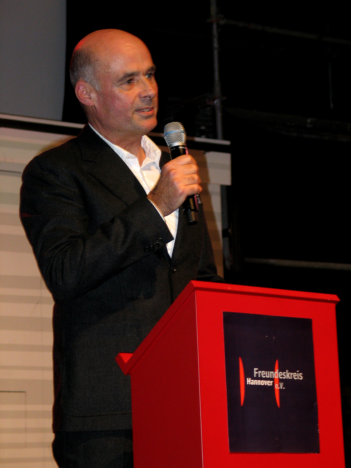 Burkhard Inhülsen, Lehrer an der Leibnizschule und insbesondere Initiator von up-and-coming Int. Film Festival Hannover, hob in seiner Dankesrede insbesondere die in die hunderte zählenden Helfer an dem mittlerweile größten Nachwuchs-Filmfestival der Welt hervor ...